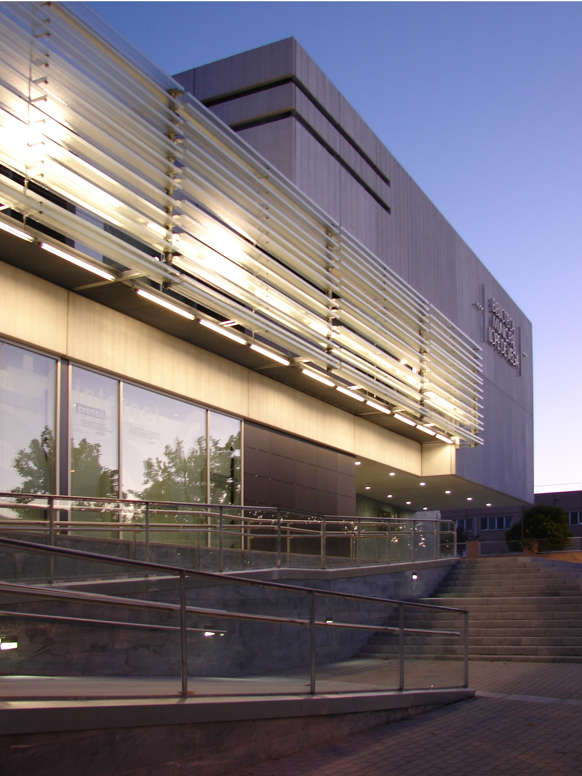 Biblioteca Municipal. Public Library "Lope de Vega" de Tres Cantos (Madrid)